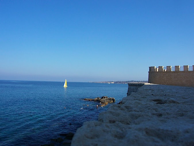 Lungomare d'Ortigia